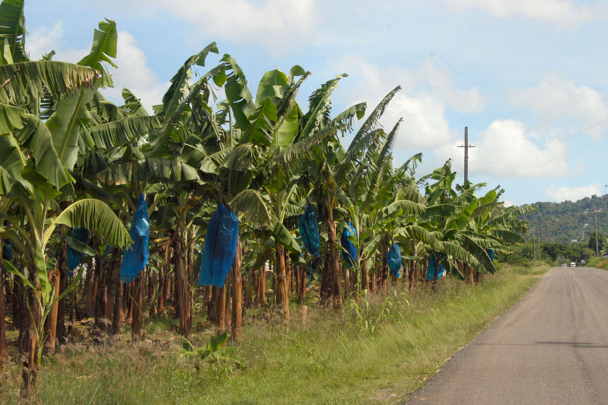 Banana plantation